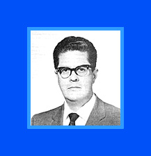 Foto escaneada del ing. Guillermo González Camarena y mejorada por su servidor.